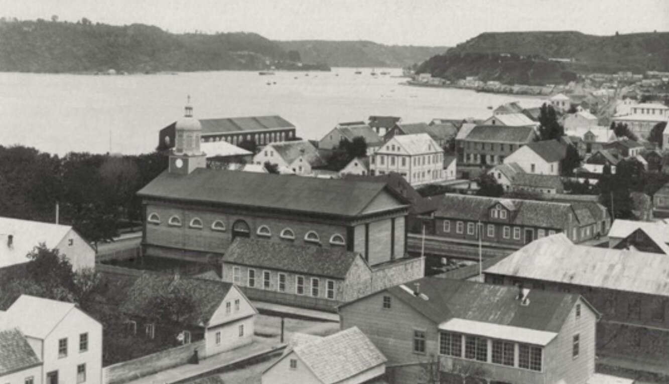 Vista de Puerto Montt en 1905. Archivo Fotográfico Alejandro Torres